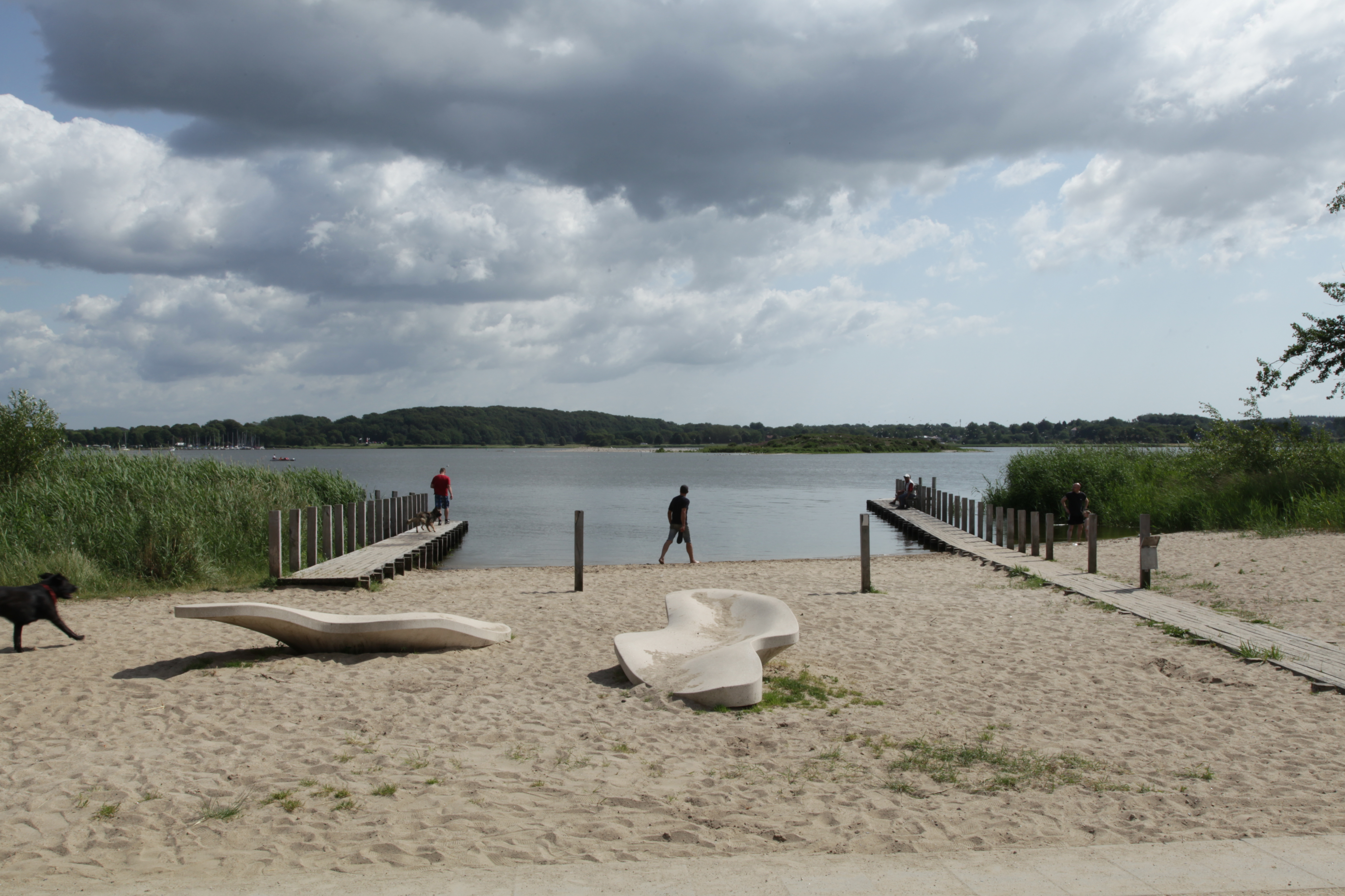 Schleiufer an den Königswiesen in Schleswig